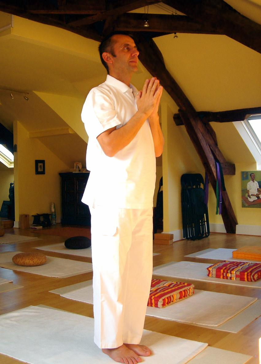 Yoga postures